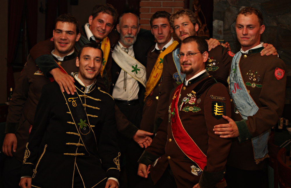 Az Erdőmérnöki Szak fennállásának 200. évfordulóján Selmecbányán 2008. szeptember 11-én lezajlott szakestély szalagos tisztségviselői. Praeses: Dr. Varga Szabolcs a. Nagykarom; Cantuspraesesek: Mészáros Péter a. Merev húr, Békési Péter a. Jumurdzsák; Contrapunktok: Kovács Ferenc a. Karak, Laki Balázs a. Időszakos döhérség; Majordomusok: Juhász Pál a. Bütyök, Török Csaba a. Idealista; Fuchsmajor: Koklács Tibor a. Töki